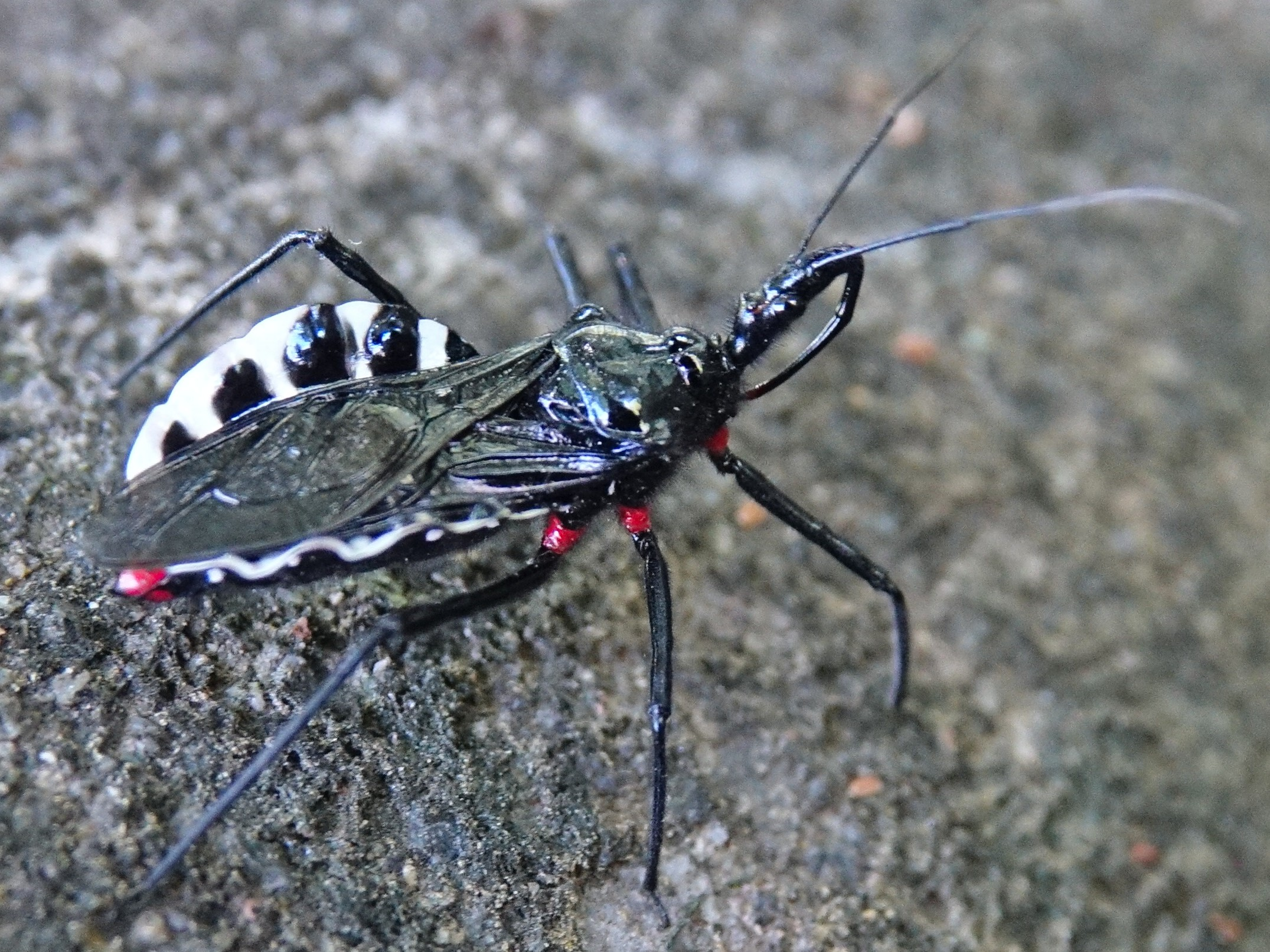 ヨコヅナサシガメの側面 日本、東海地方